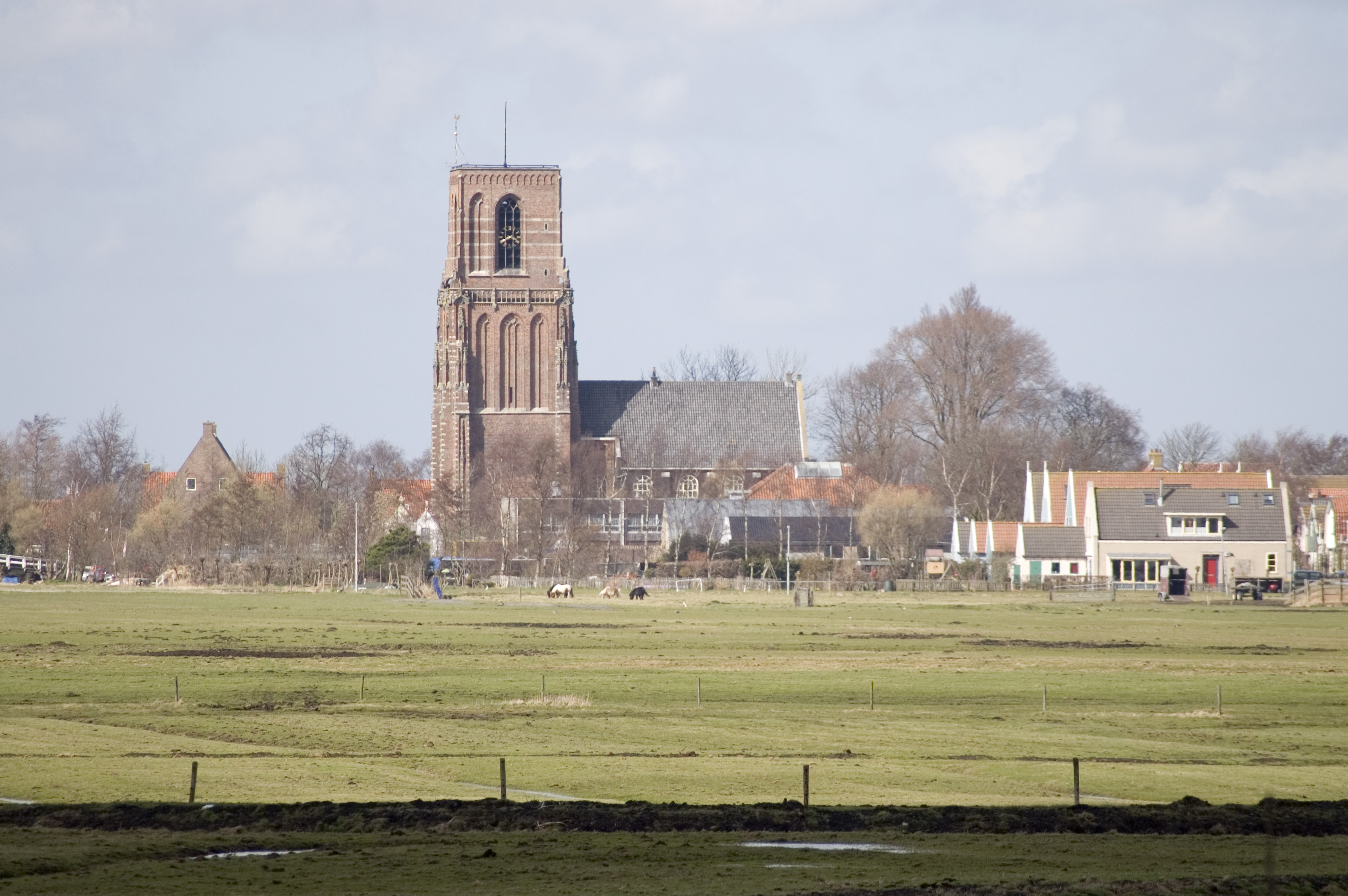 Toren van Ransdorp, gezien over land.